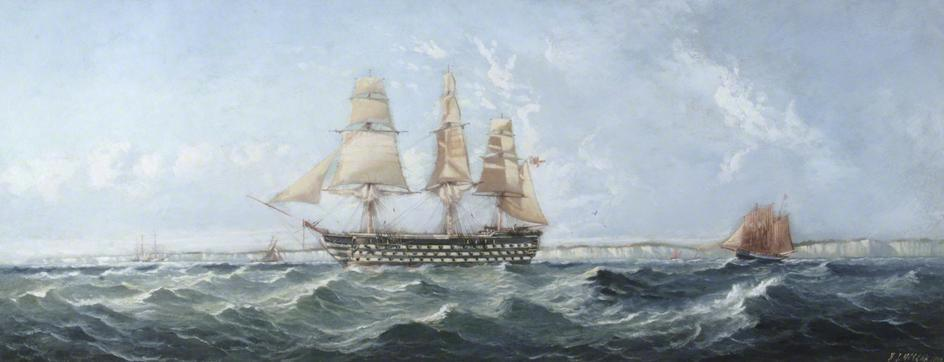 HMS 'Britannia'